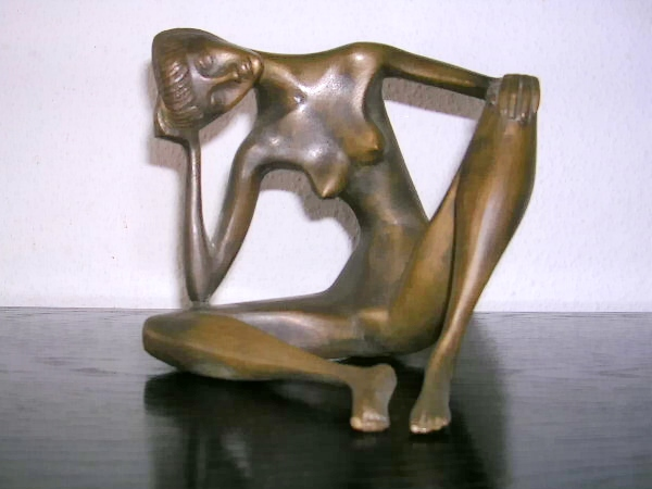 Kleinplastik „Sitzendes Mädchen“, Bronze, 1968, geschaffen von dem deutschen Bildhauer Heinz Klein-Arendt (1916–2005) aus Bergheim-Oberaußem.